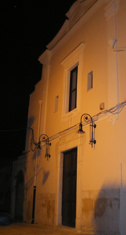 Facciata della Chiesa di Sant'Agostino.